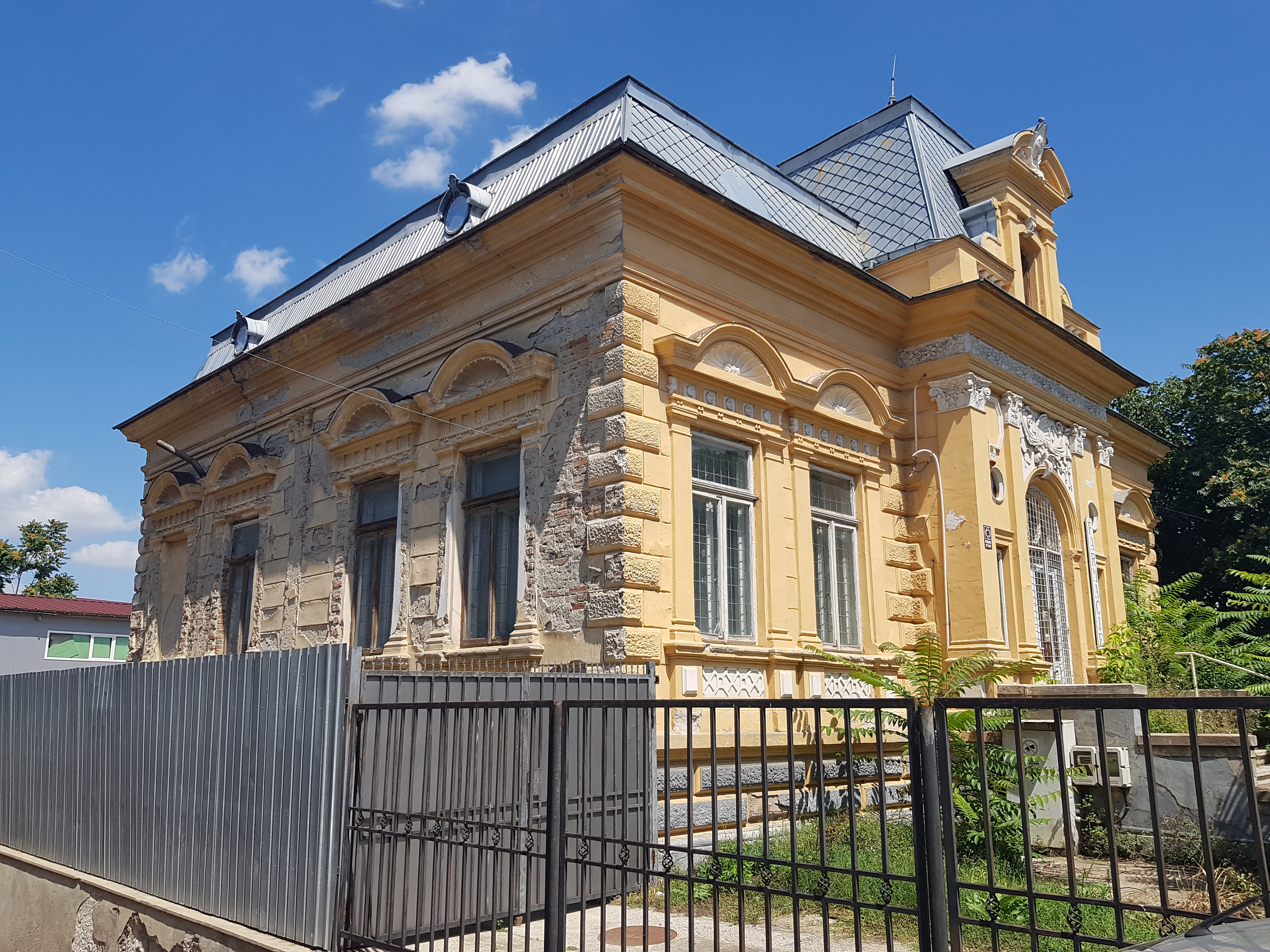 Casa Cristoff Garabet (Tănăsescu)